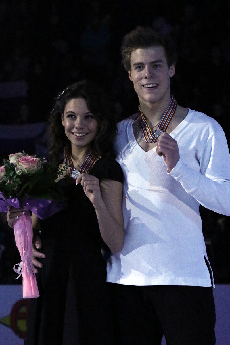 Елена Ильиных и Никита Кацалапов на Чемпионате Европы 2013